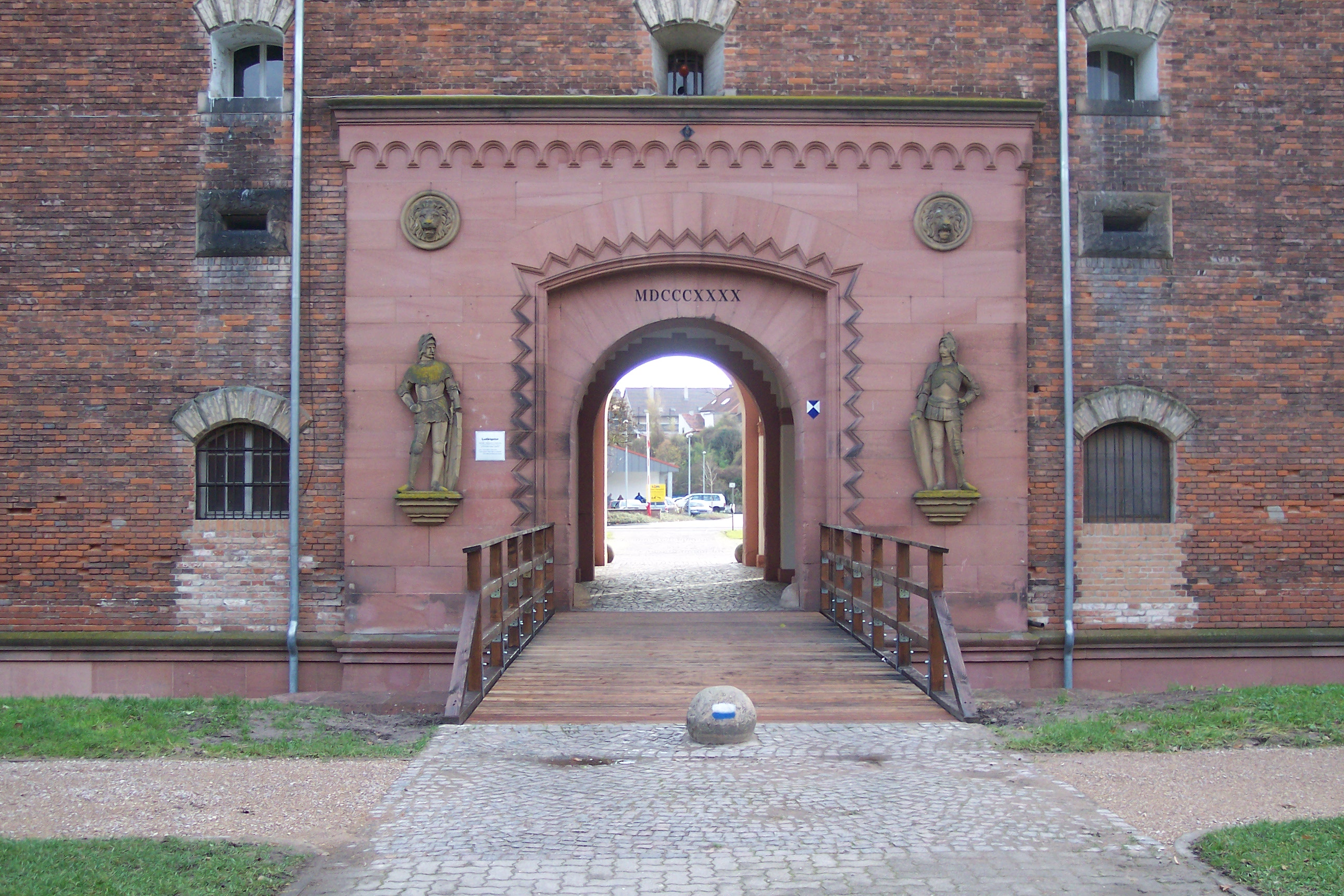 Ludwigstor von „außen“.